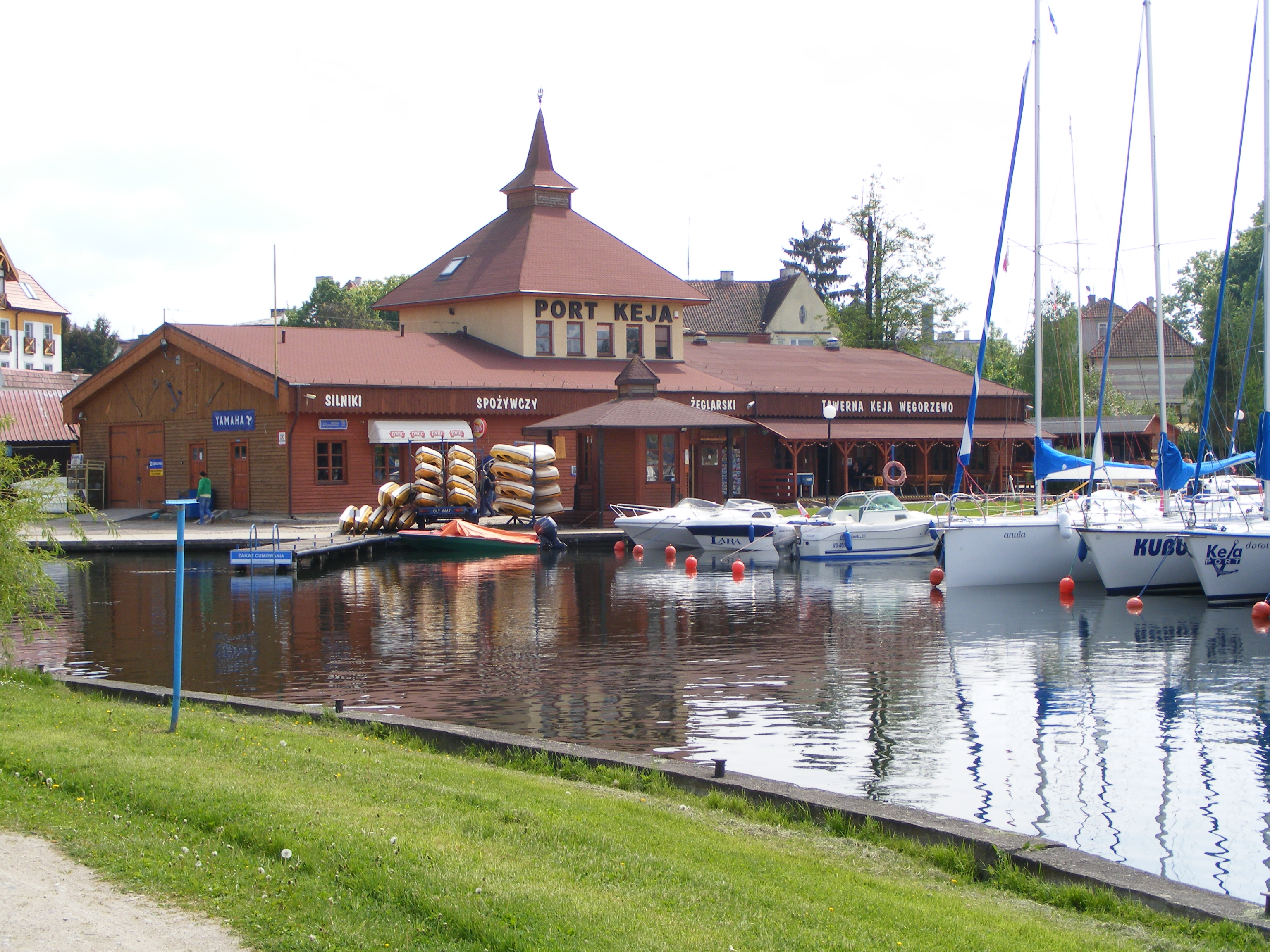 PORT.